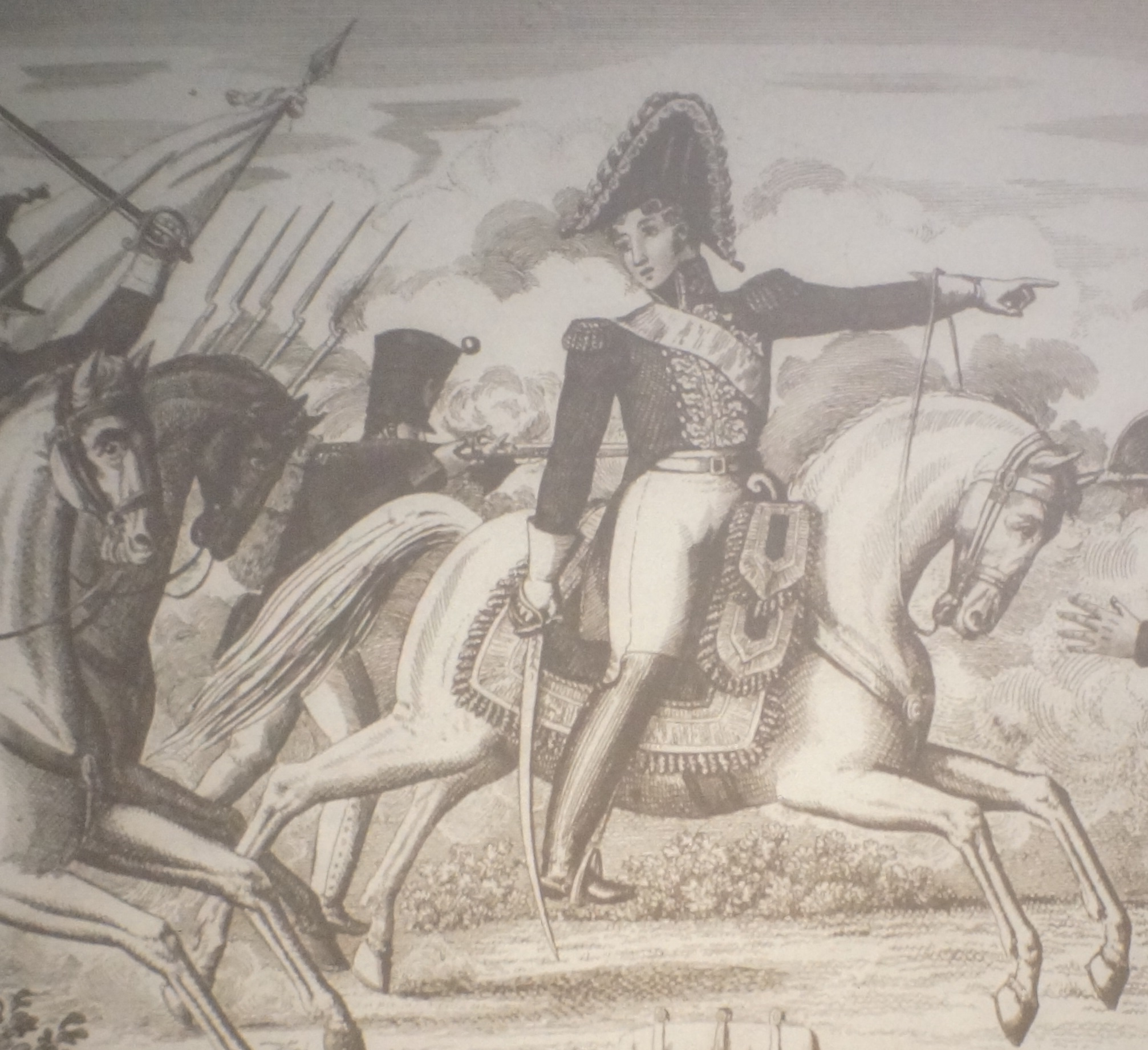 le Général Girardin à la bataille de Montmirail est à la tête de cuirassiers.